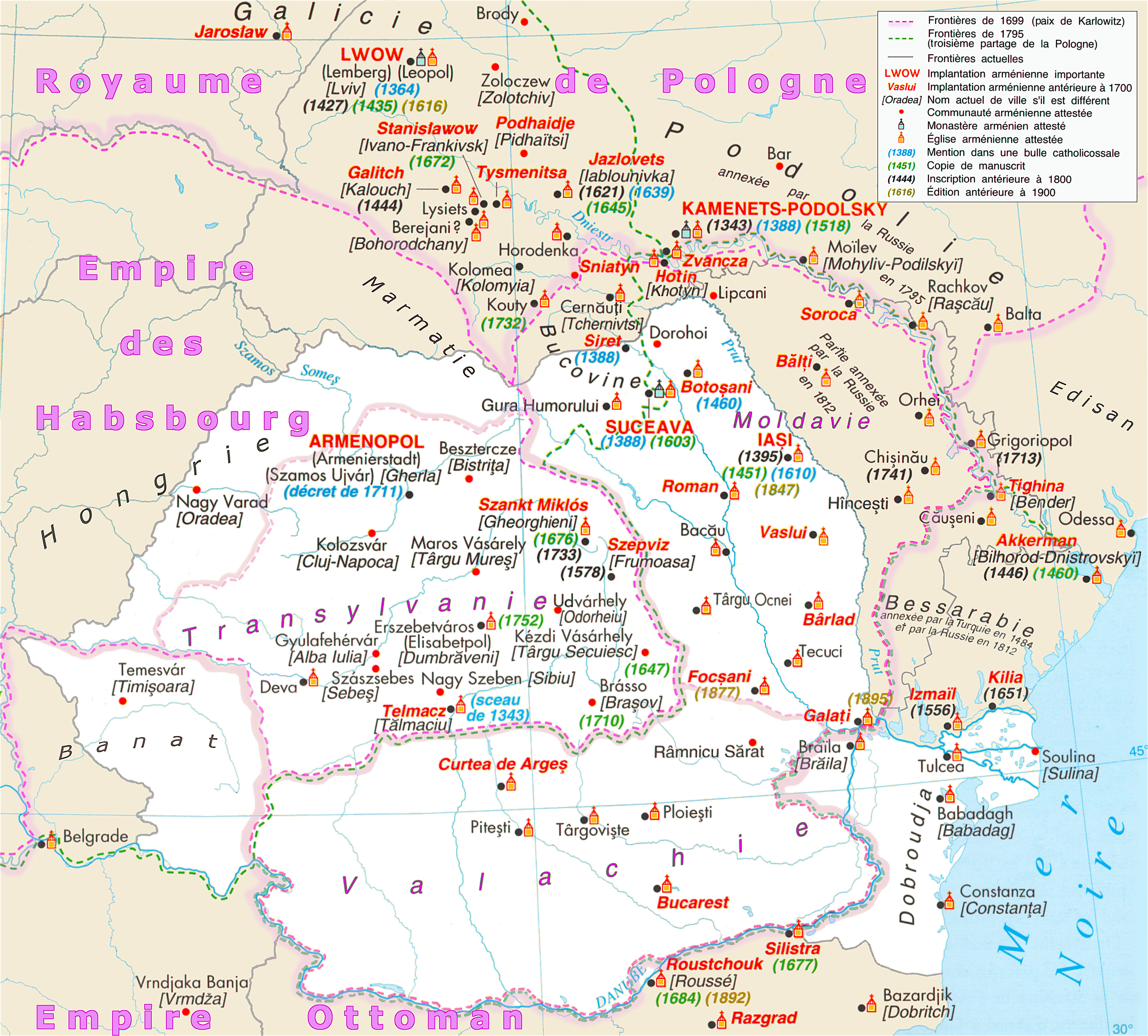 Les communautés arméniennes historiques de Roumanie, d'après l’Atlas historique de l'Arménie, synthèse de deux cartes largement modifiées: séparé Emp. Ottom. de ses tributaires, enlevé graphies erronées prises pour des noms plus anciens, utilisé la translittération spécifique du cyrillique moldo-valaque, mentionné diverses régions...